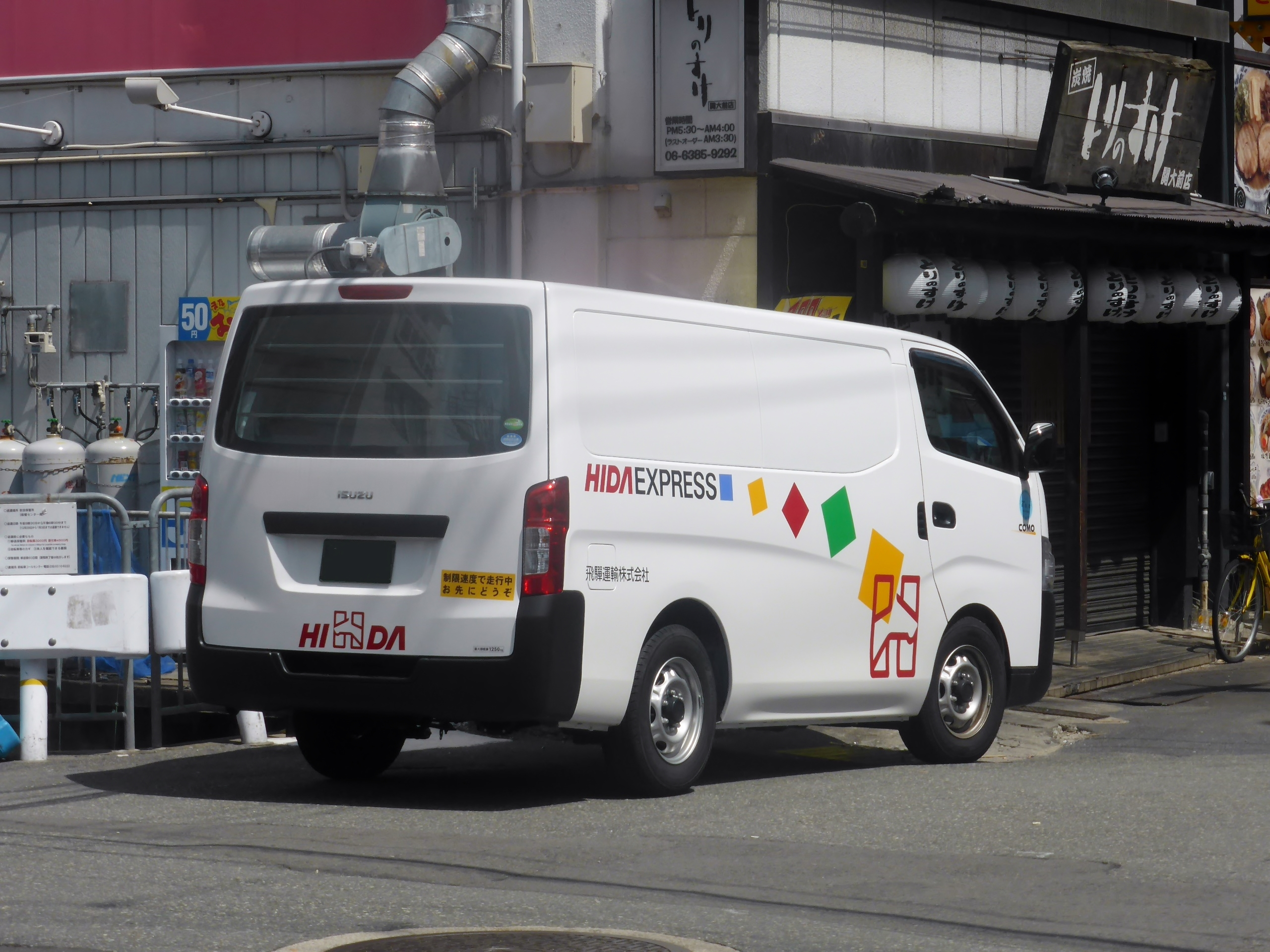 E26型いすゞ・コモをリアから撮影。